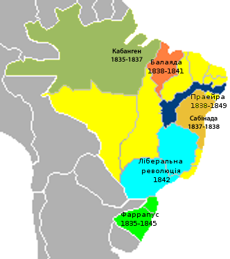 Території, охоплені повстаннями в Бразилії в середині 19 століття